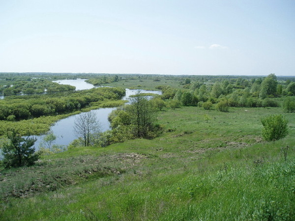 Рака Іпуць у вёсцы Вылева Добрушскага раёна